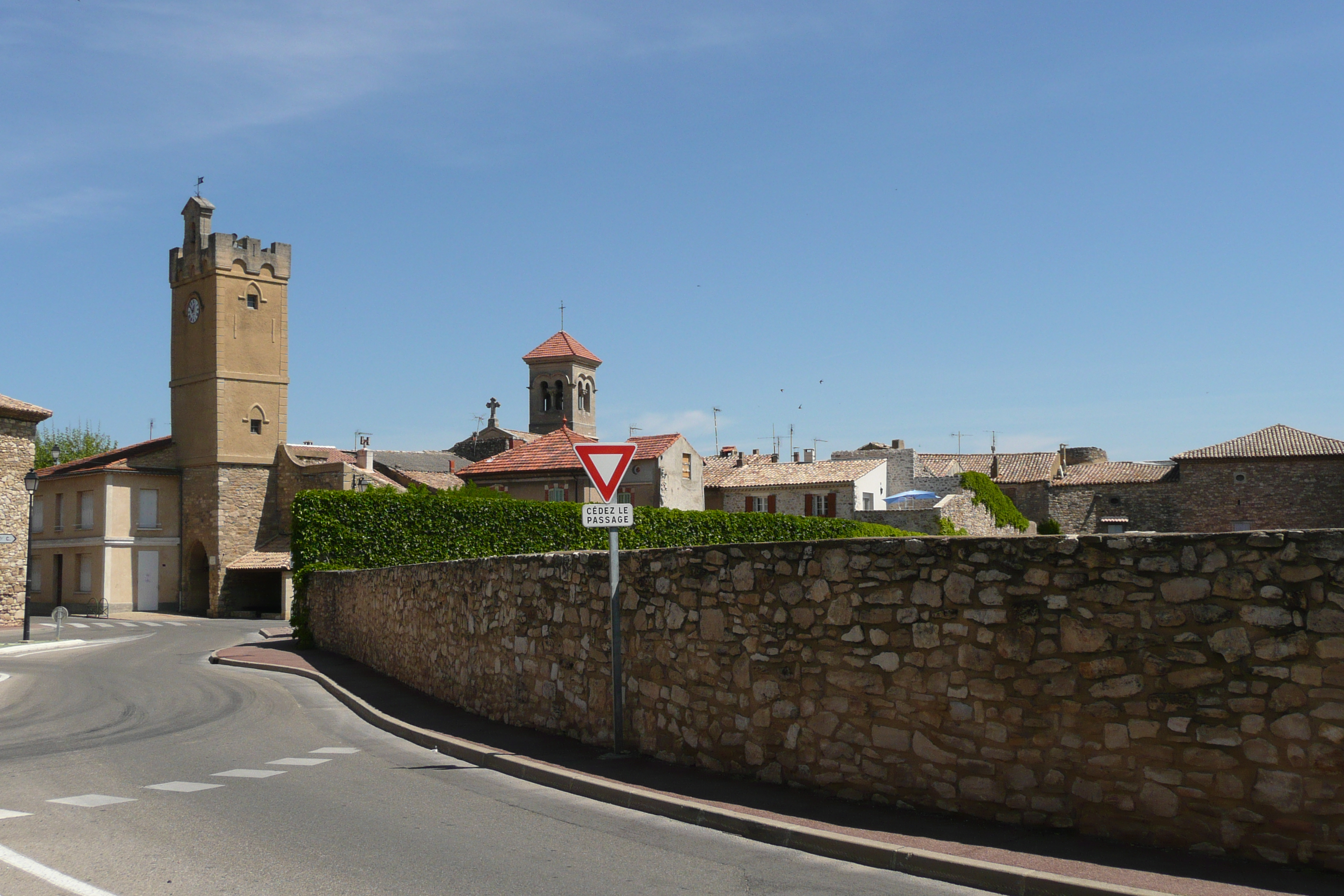 Orsan.